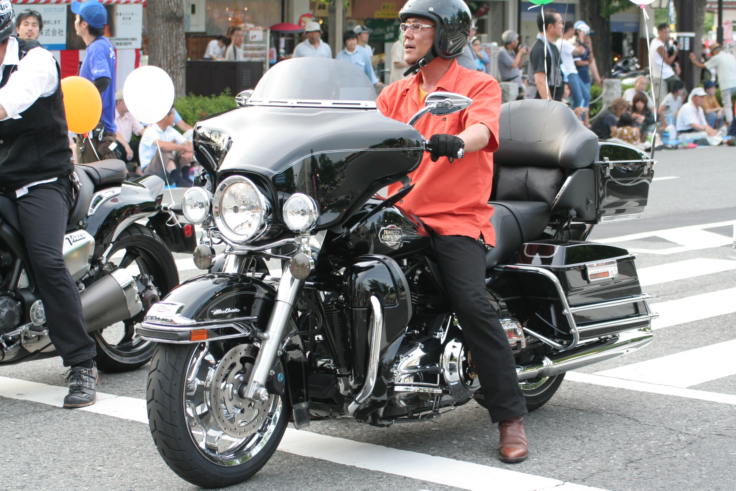 姫路お城祭り。2010年8月6日から9日の3日間に兵庫県姫路市にて開催された姫路の祭り。2日目の大手前公園および大手前通りでのパレードの模様。